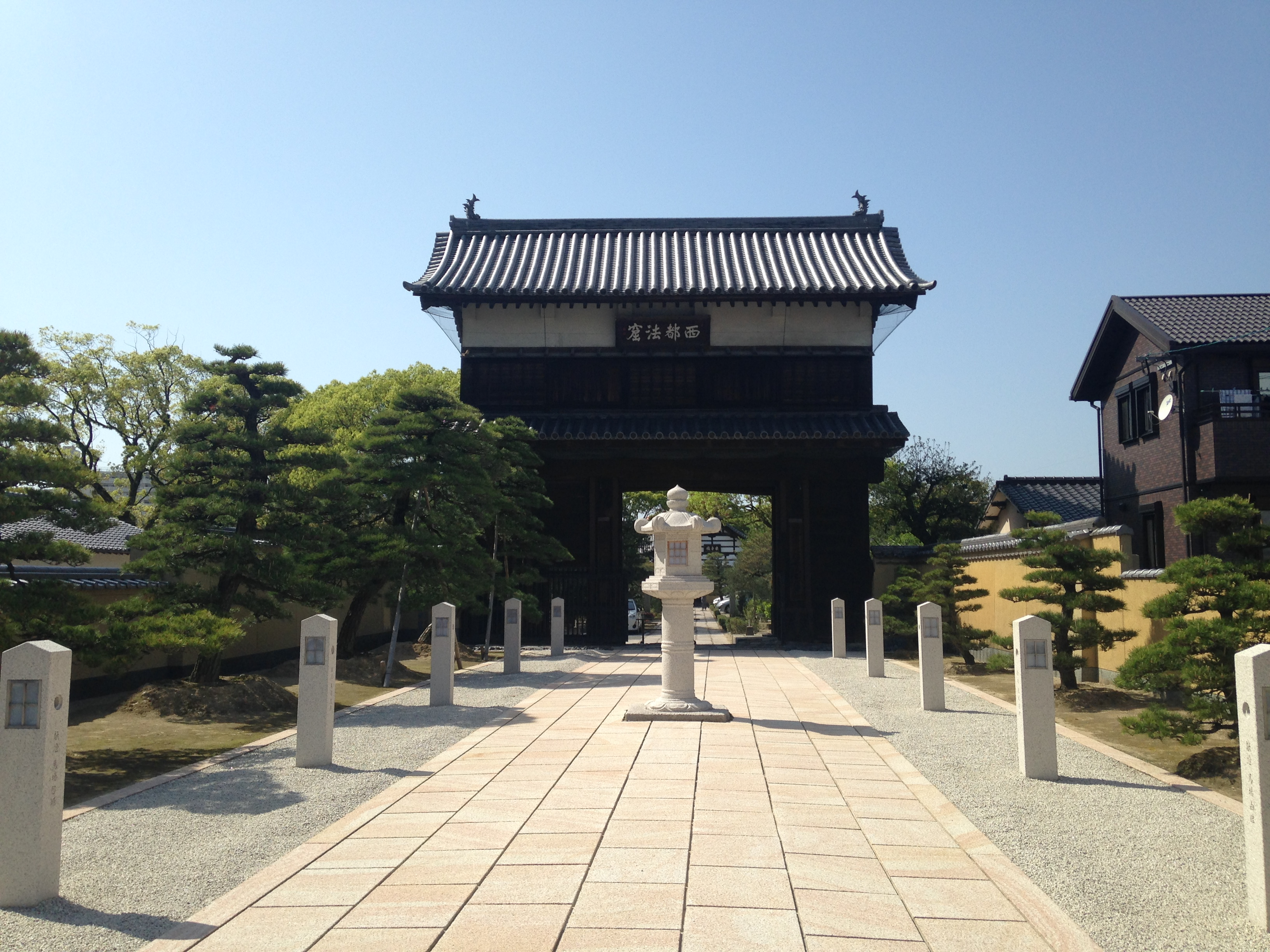 崇福寺の山門